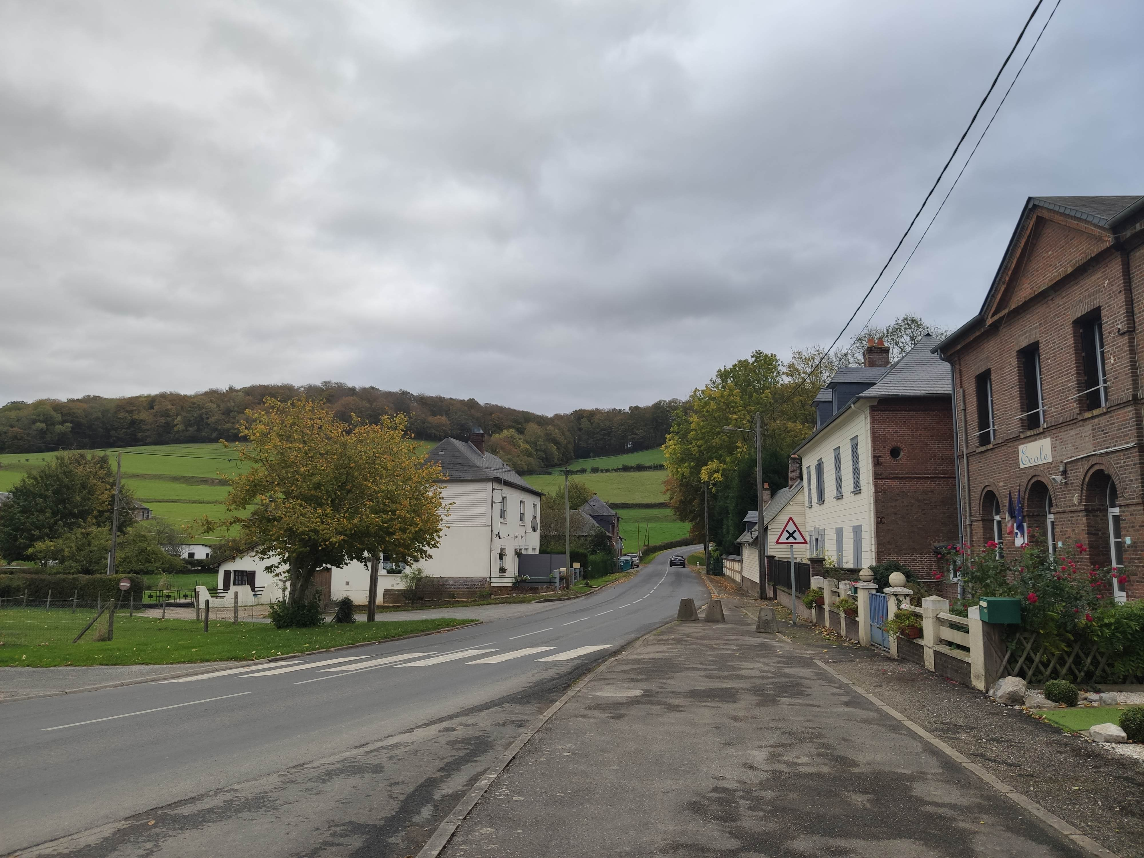 Marques : La route principale (ex RN 320, actuelle RD 920)